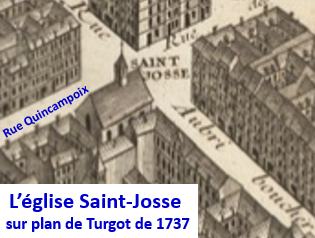 Église St-Josse sur plan de Turgot